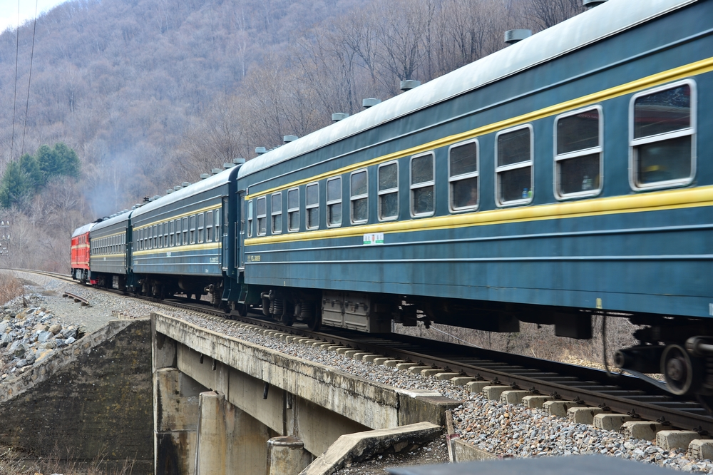 客车6350次通过道口